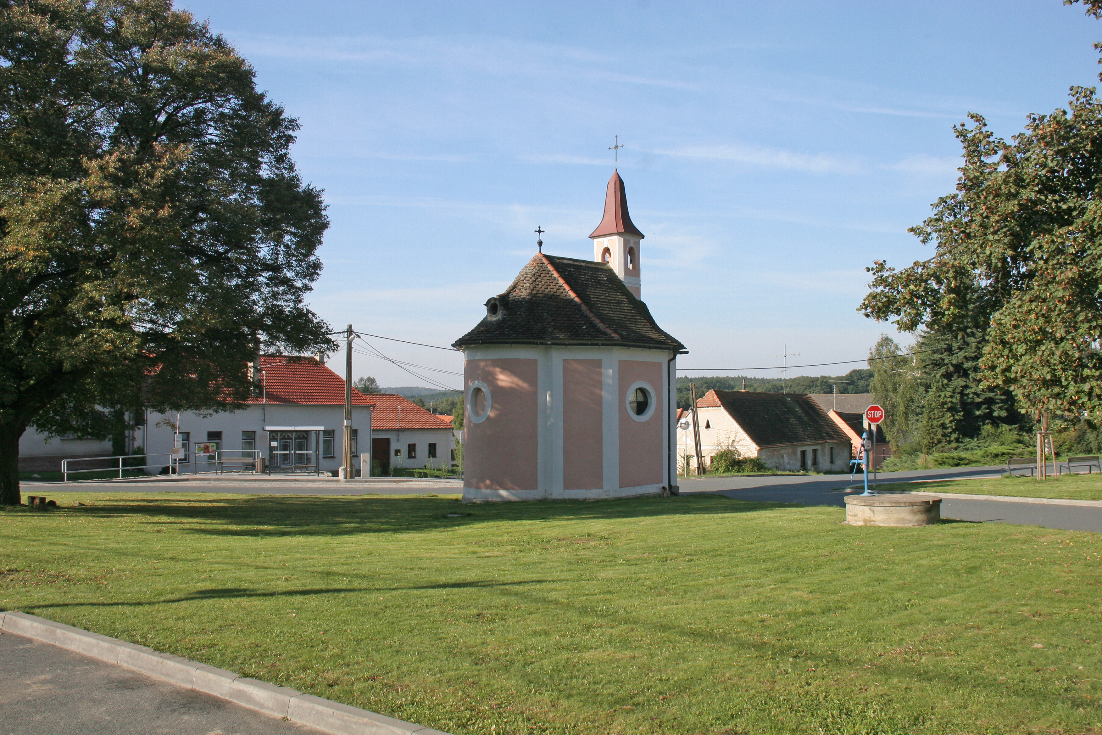 Kaple Bolestné Panny Marie, Podmolí.